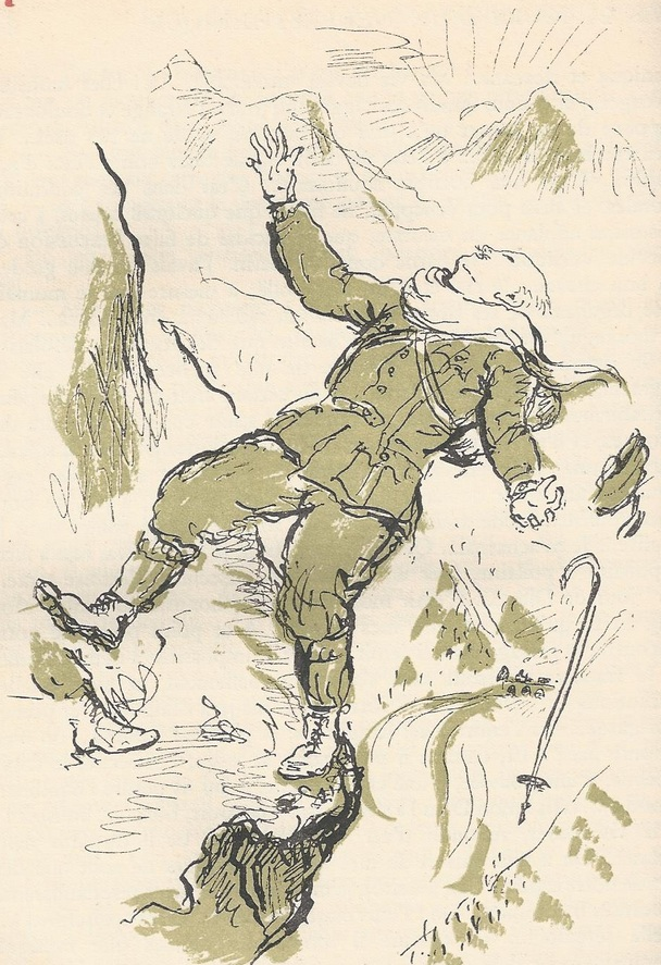 Illustration de Jean Launois (1898-1942) pour "Les 21 jours d'un neurasthénique", d'Octave Mirbeau (1848-1917). Éditions Nationales, 1935.